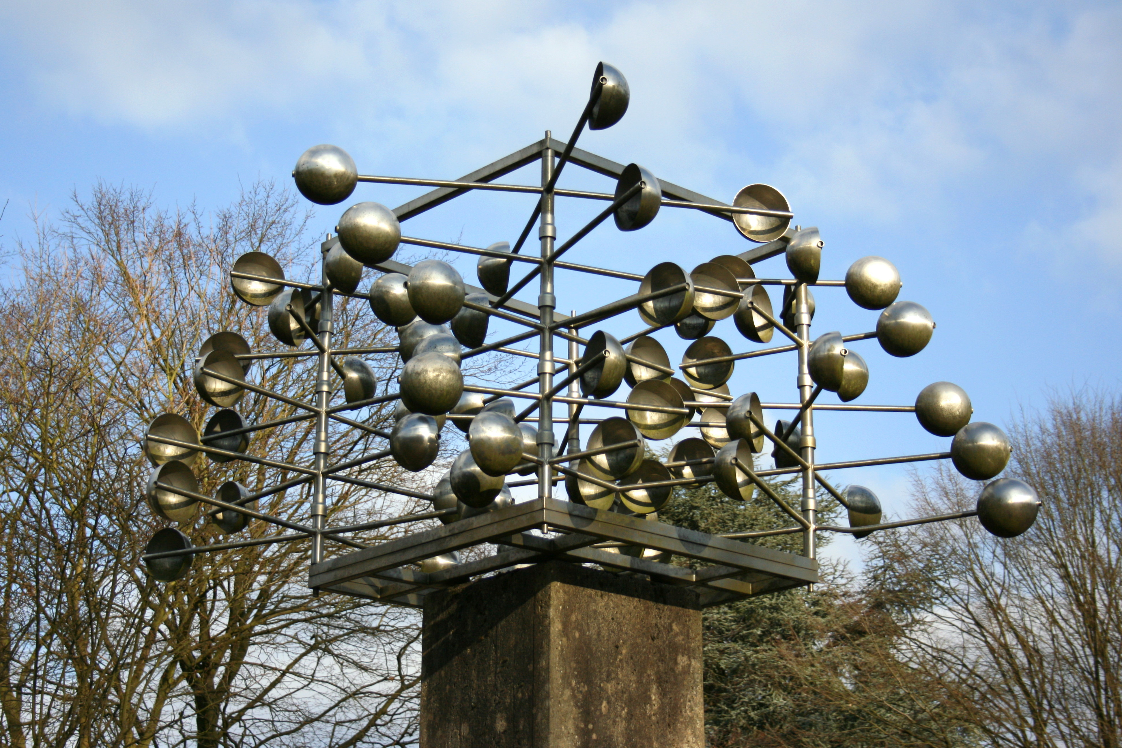 Windspiel (Hein Sinken) am Stadtbad Vohwinkel in Wuppertal